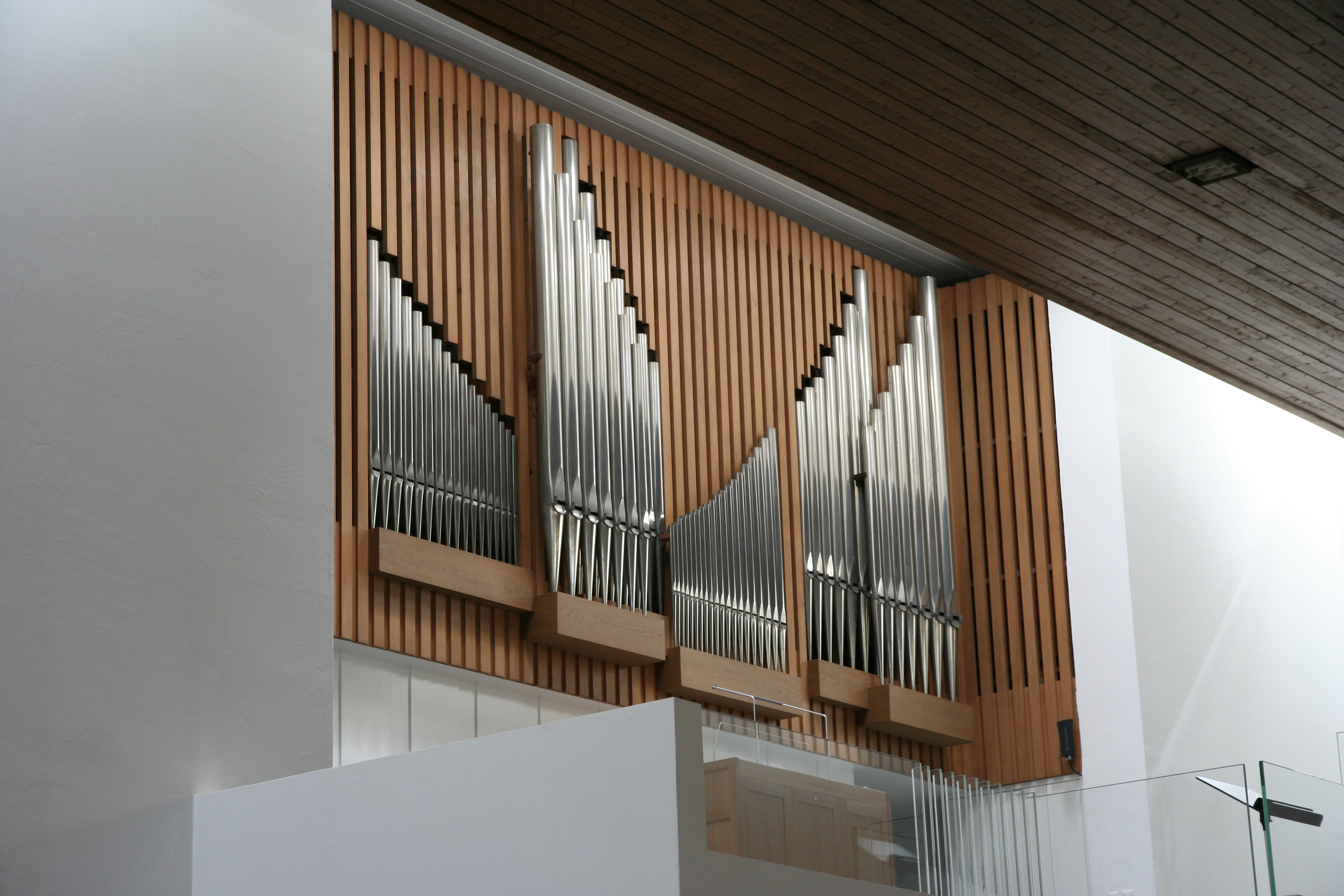 Römisch-katholische Pfarrkirche Dreifaltigkeit Rüti ZH, Orgel